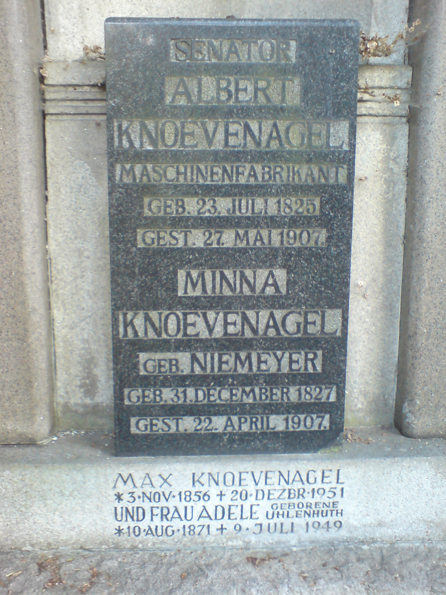 Grabinschriften auf dem Familiengrab von Albert Knoevenagel